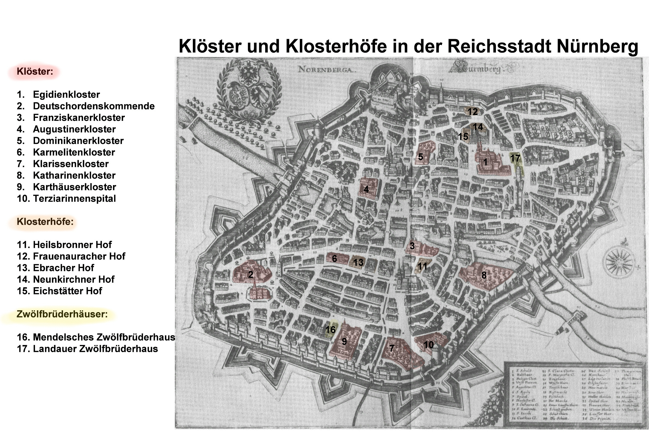 Nürnberg - Lage der ehemaligen Klöster und Klosterhöfe in der Karte von Matthäus Merian - 1642